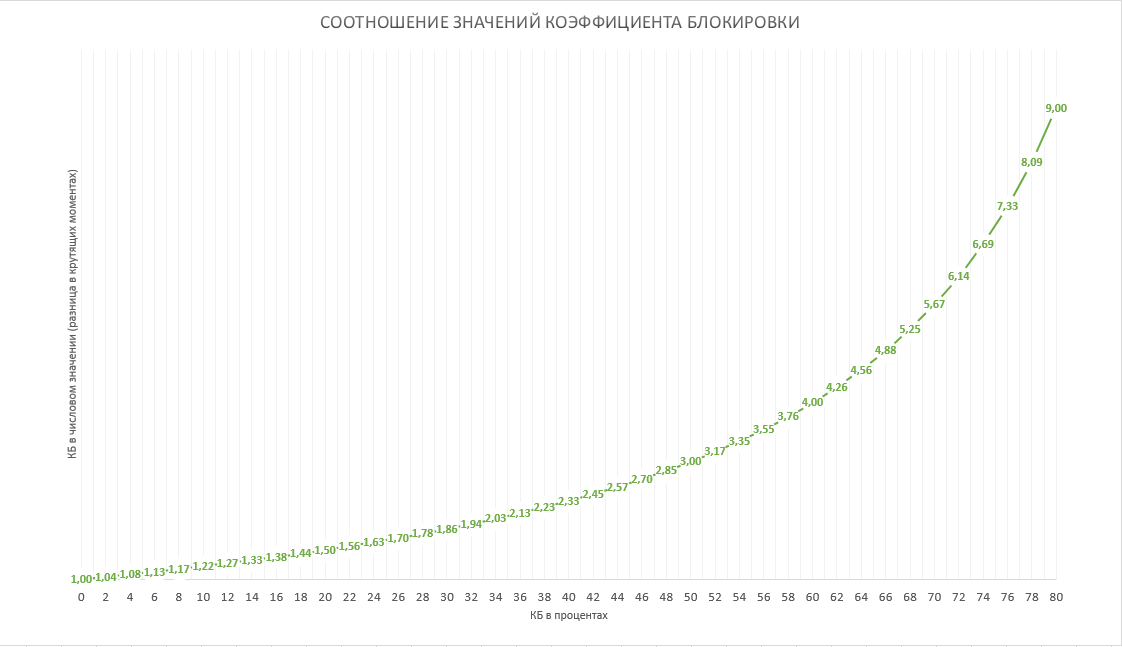 Показано соотношение между КБ в числовом и процентном значениях